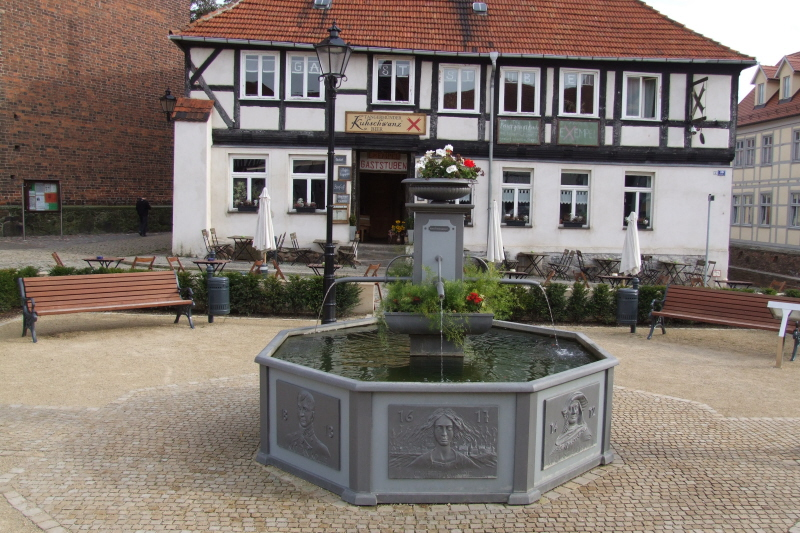 Stadtbrunnen vor der St. Stephanskirche in Tangermünde mit Motivplatten von Karolin Donst; im Hintergrund das Restaurant "Kuhschwanz"